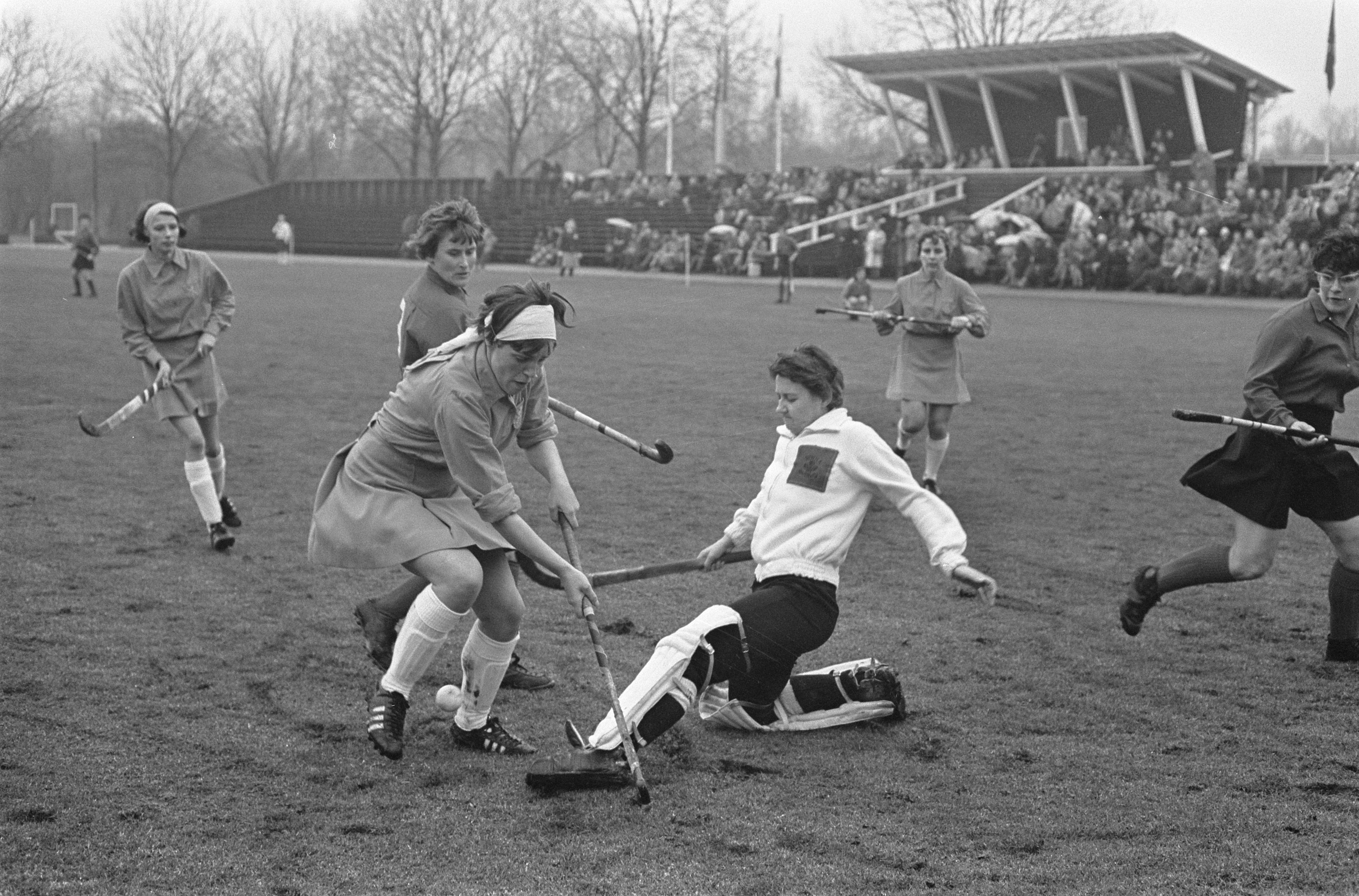 Collectie / Archief : Fotocollectie Anefo Reportage / Serie : [ onbekend ] Beschrijving : Hockey dames Nederland tegen Wales, Heleen van Rooy (l) en D. Davidge Datum : 16 april 1966 Trefwoorden : hockey Persoonsnaam : D. Davidge Instellingsnaam : Nederland Fotograaf : Nijs, Jac. de / Anefo Auteursrechthebbende : Nationaal Archief Materiaalsoort : Negatief (zwart/wit) Nummer archiefinventaris : bekijk toegang 2.24.01.05 Bestanddeelnummer : 919-0364